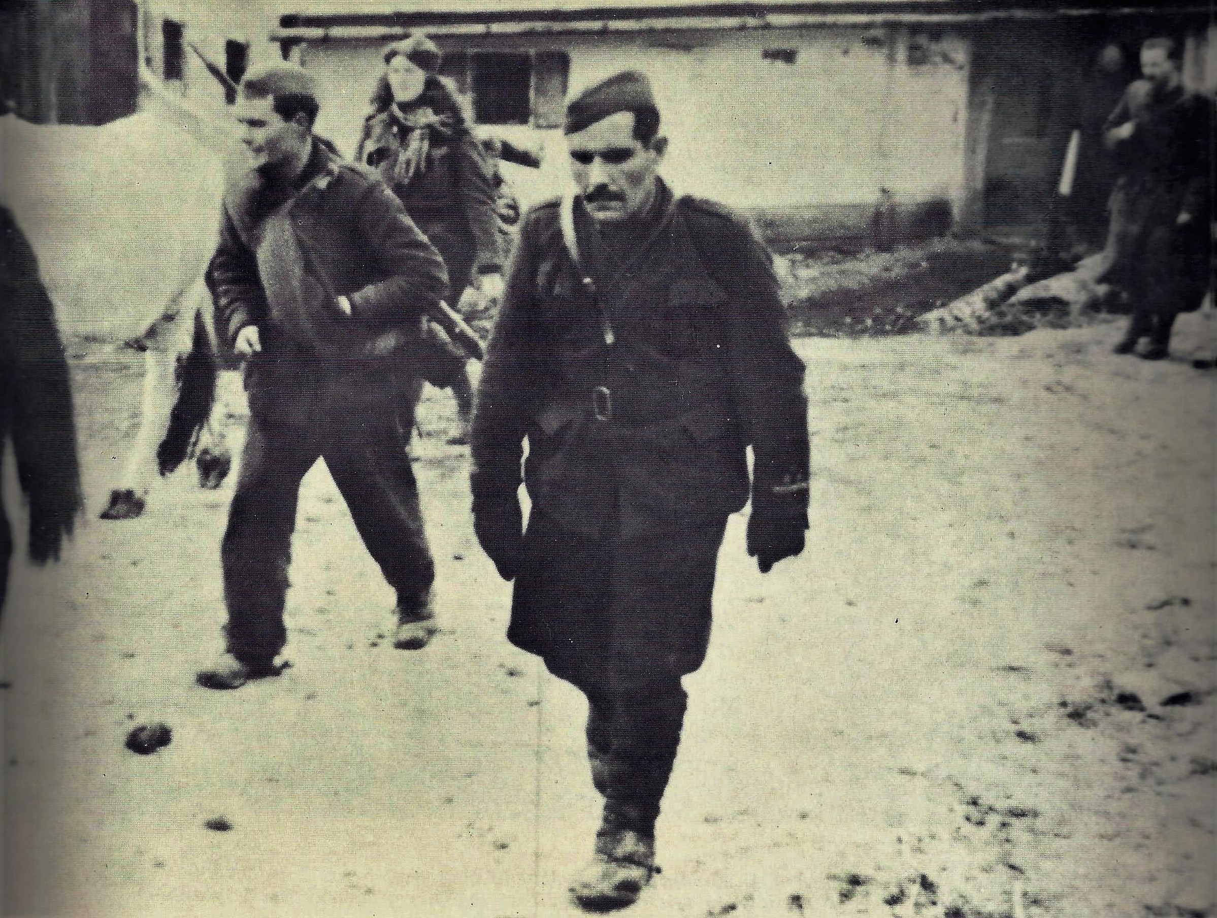 Komandant Šercerjeve brigade Jakob Rihar-Jaka med pohodom 14. divizije